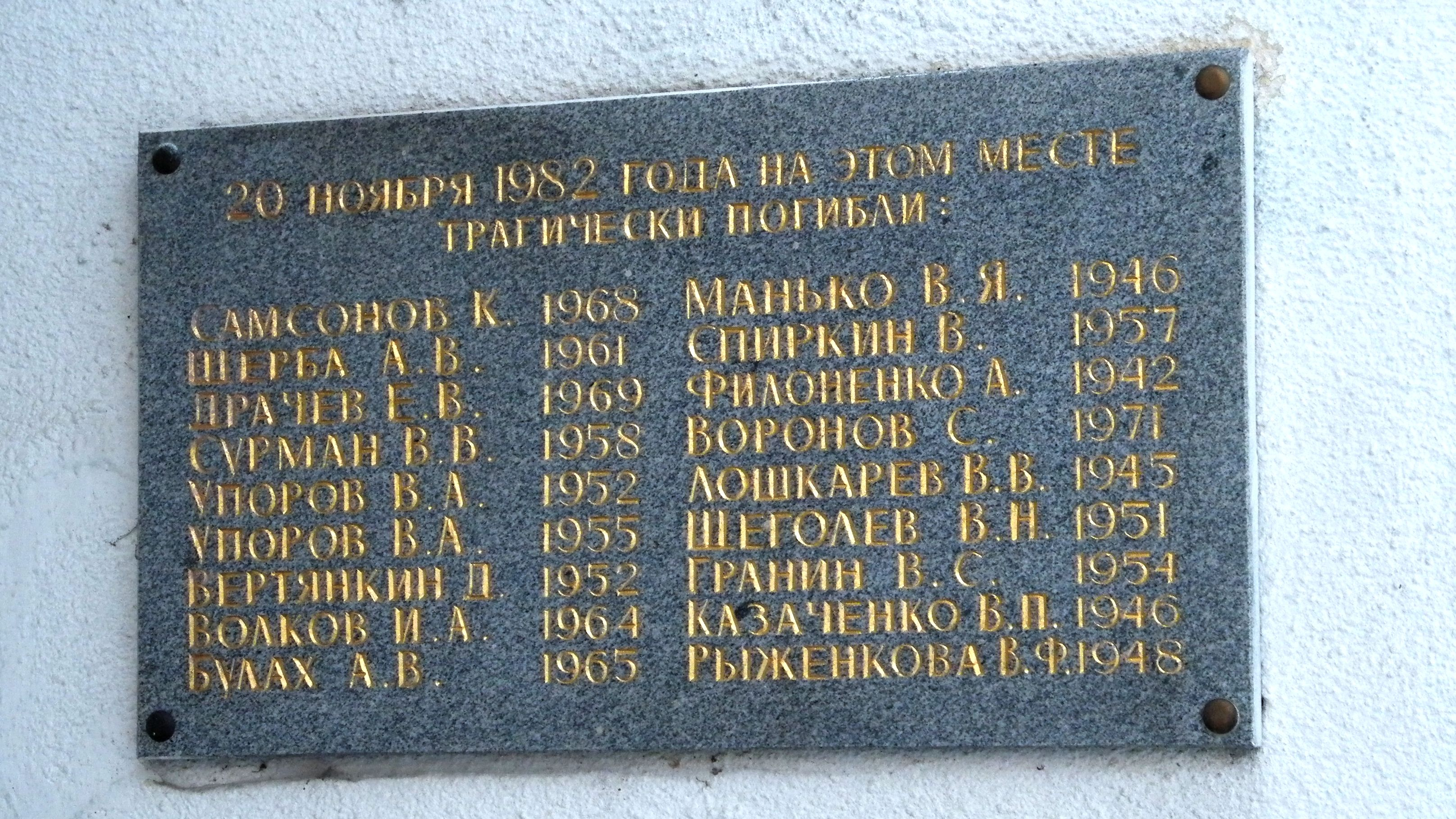 Памятная доска на стадионе имени Ленина, Хабаровск